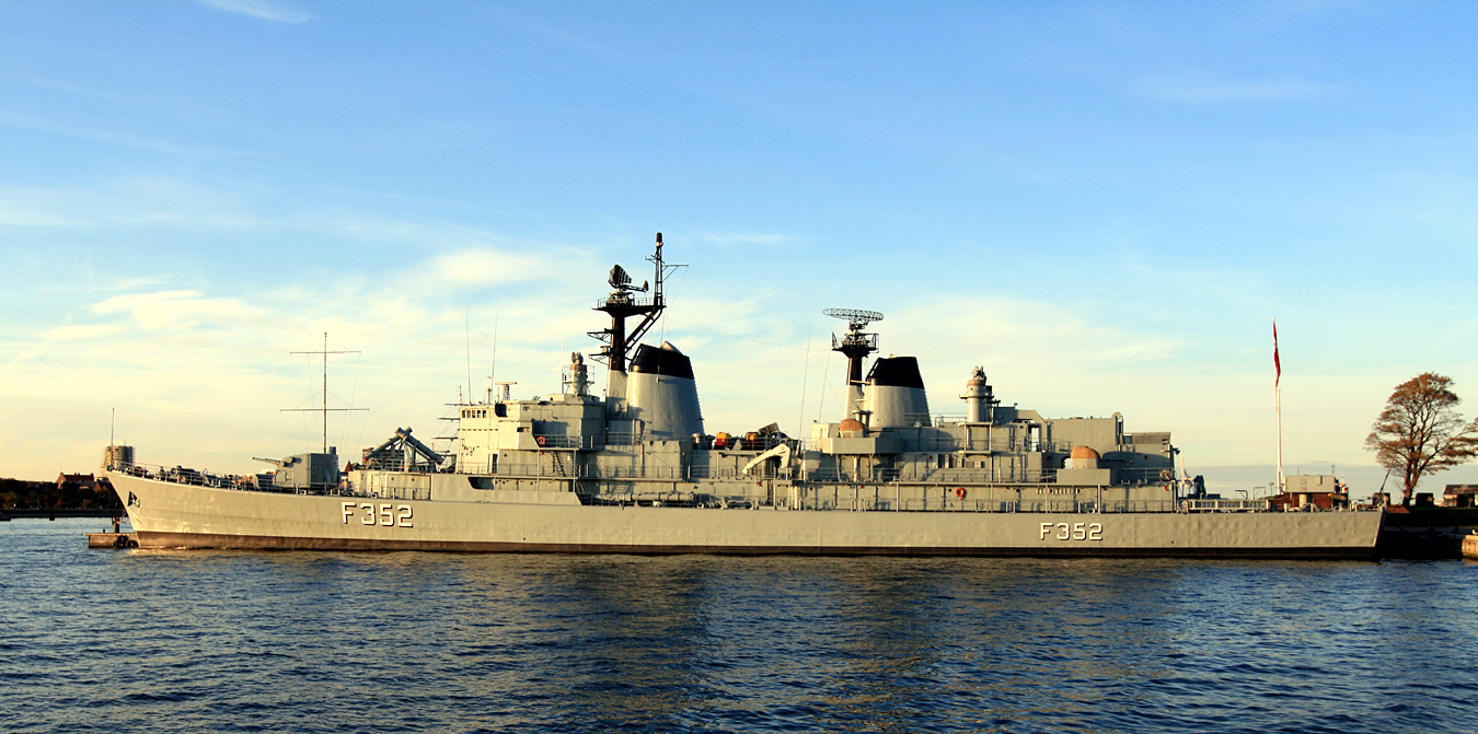 Frigate Peder Skram, Copenhagen, Denmark. Today a museum ship.